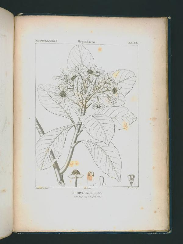 Icones selectae plantarum quas in systemate universali :ex herbariis parisiensibus, praesertim ex Lessertiano /descripsit Aug. Pyr. de Candolle, ex archetypis speciminibus a P.J.F. Turpin delineatae et editae a Benj. De Lessert ...